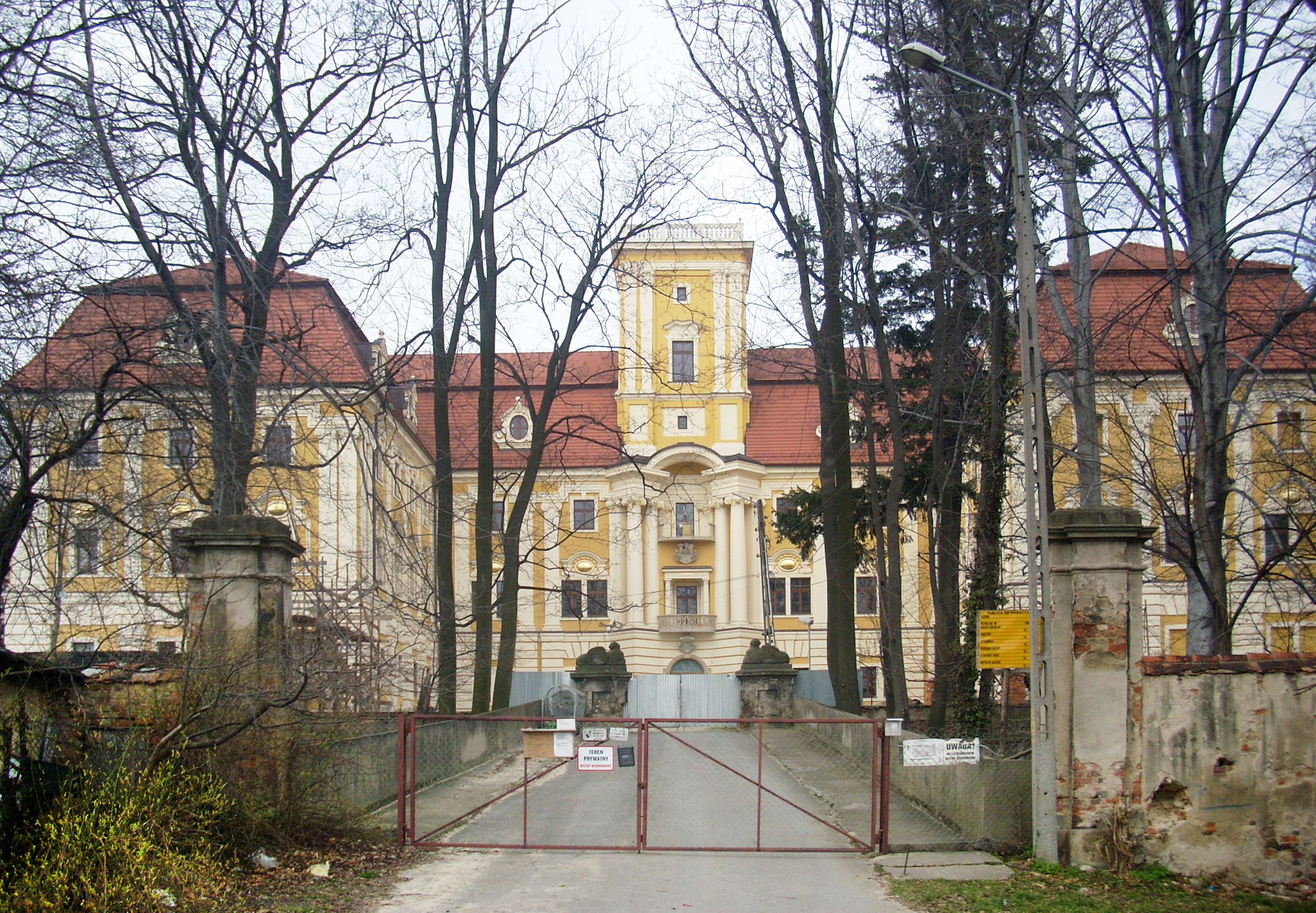 Pieszyce - zamek (zabytek nr 462) zamek